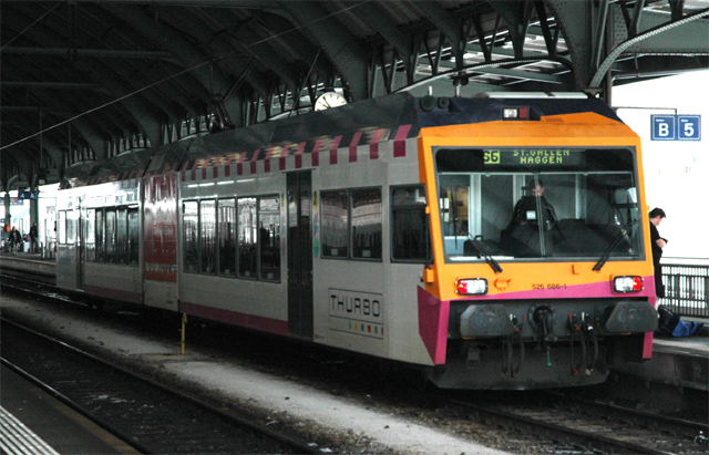 GTW MThB RABe 526 op 3-01-2006 te St. Gallen